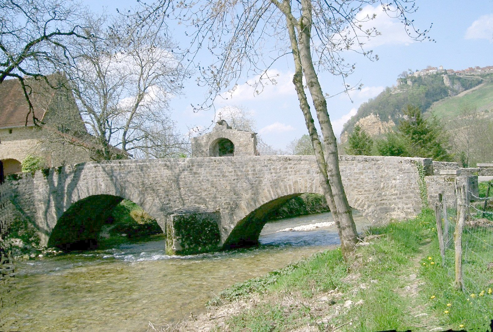 La Seille, à Nevy-sur-Seille (Jura), à quelques kilomètres de sa source au pied de Chateau-Chalon. Pont du XVIIIème siècle avec un oratoire. photo personnelle PRA